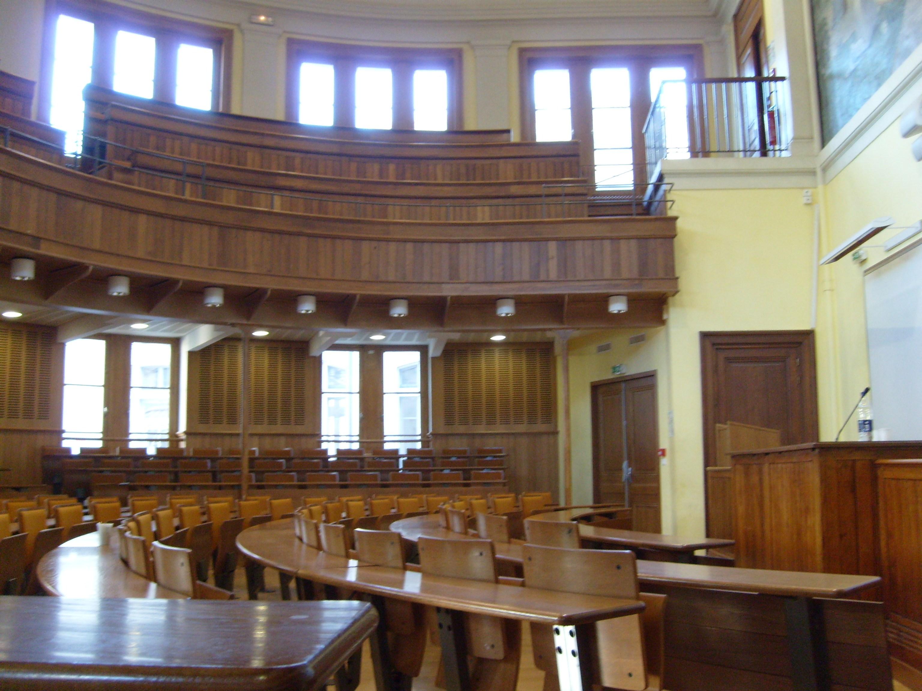 Vue intérieure de l'amphithéâtre Laprade, bâtiment Clio, campus des Berges du Rhône, Université Lyon 2 - Lumière.